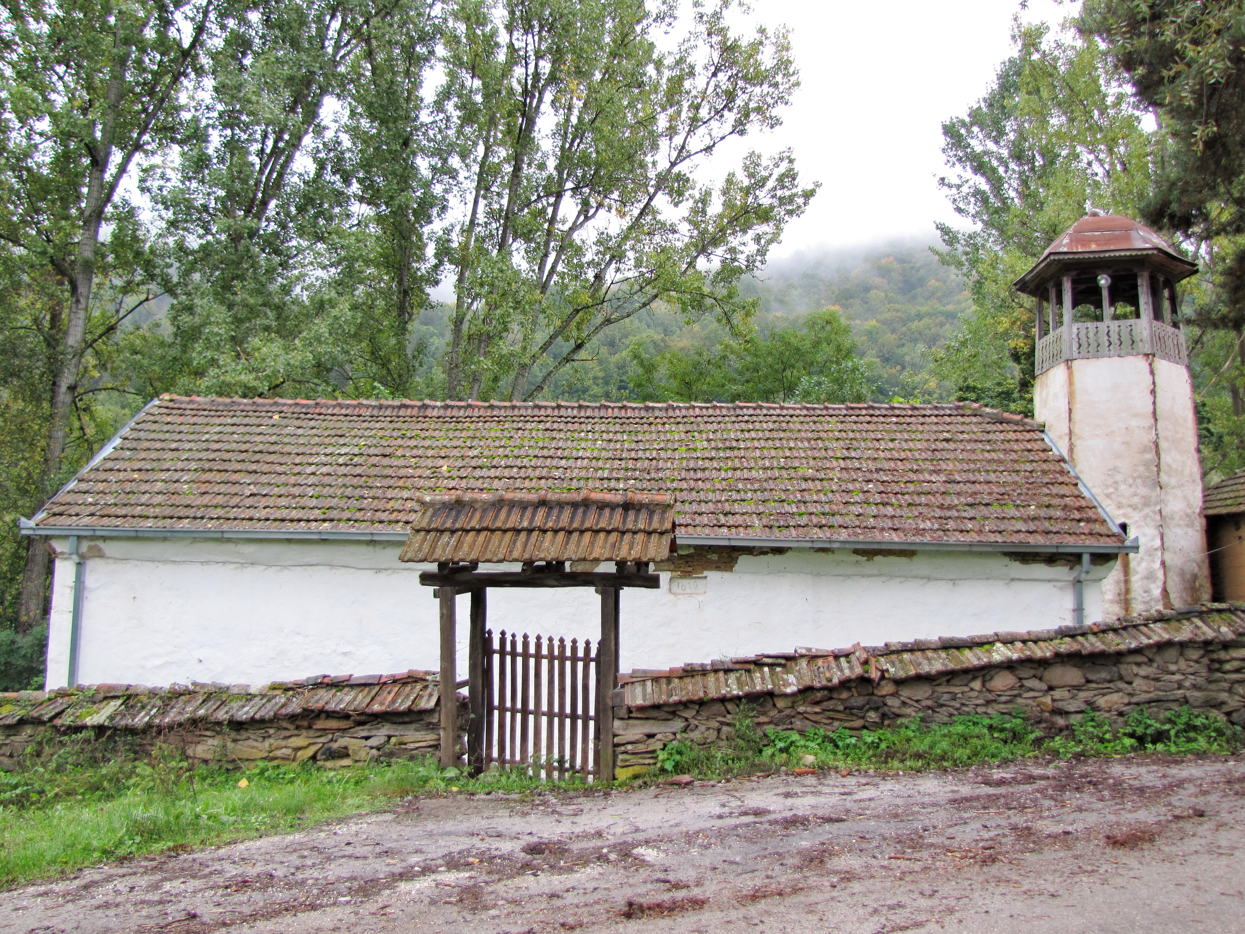 Храм светог Харалампија у Бранковцима.